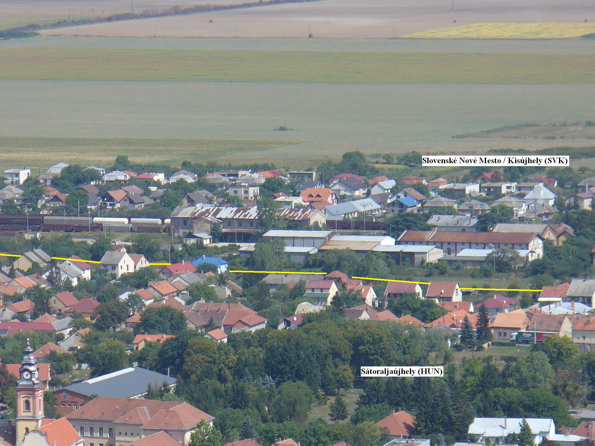 Granica pomiędzy węgierską a słowacką częścią Sátoraljaújhely (na żółto). Border (yellow line) between Sátoraljaújhely (Hungary) and Kisújhely (Slovakia, Slovenske Nove Mesto; to 1920 part of Sátoraljaújhely).